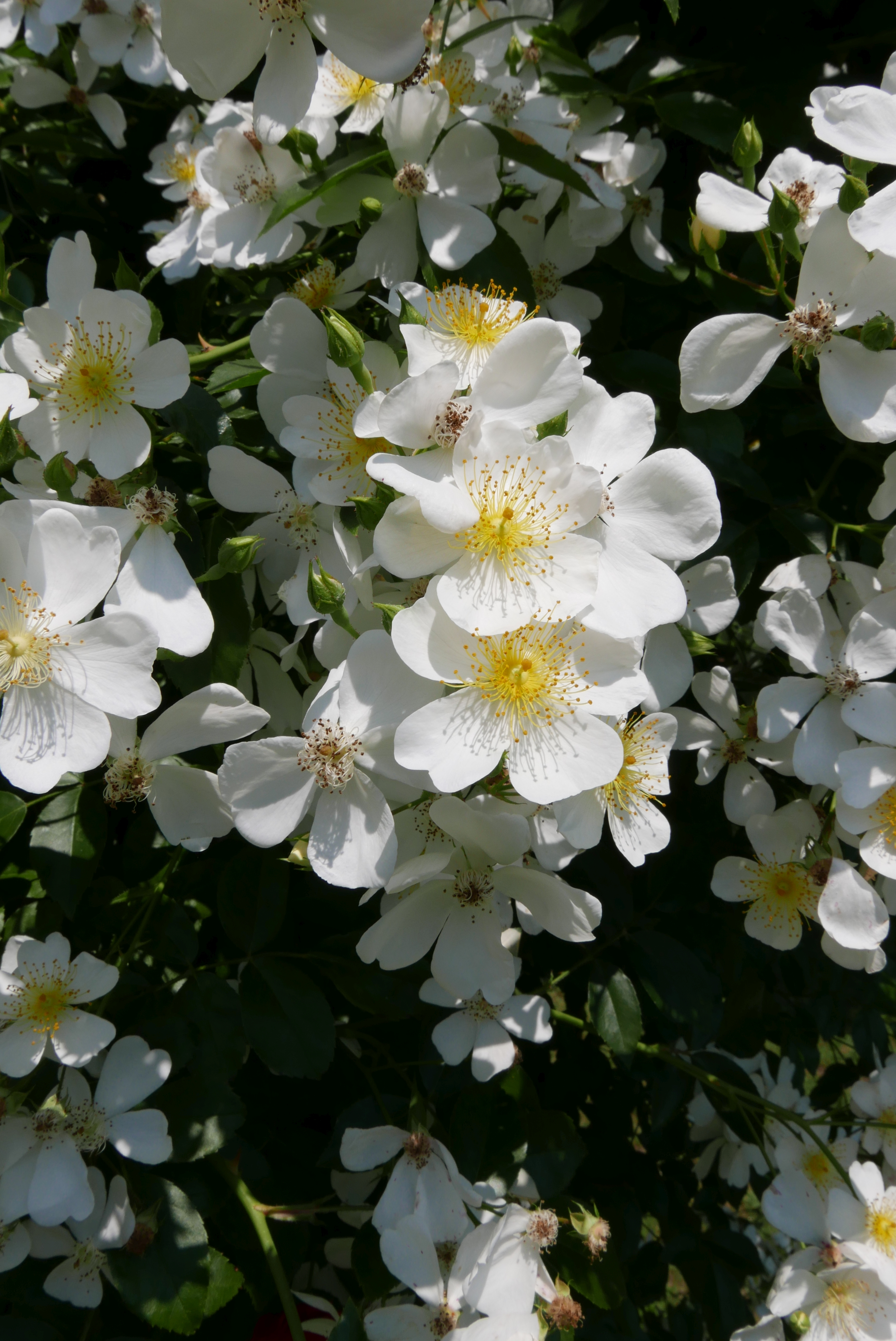 Kletterrose 'Kiftsgate' (weiß) im Rosarium Baden, 2018